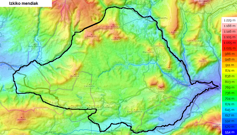 Izkiko mendien mapa topografikoa.